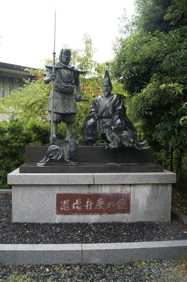 闘鶏神社境内にある熊野ja:湛増とja:武蔵坊弁慶の像